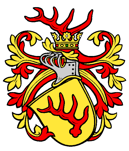 Stammwappen derer von Bieberstein